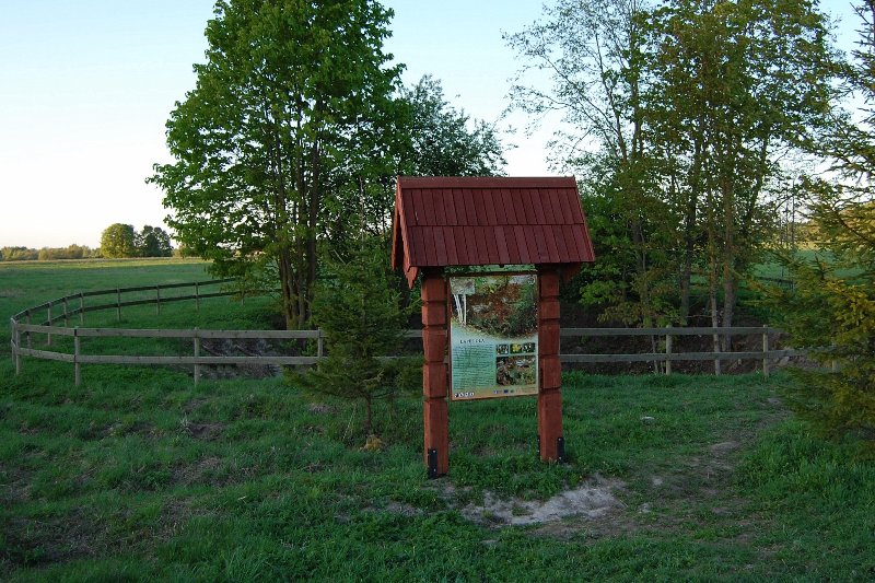 Smegduobė Lapės Ola